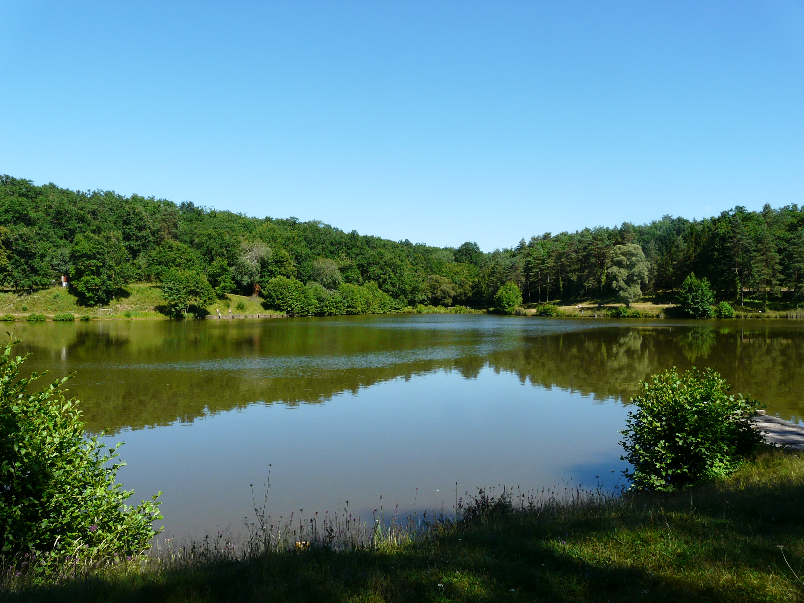 L'étang du Coucou, Hautefort, Dordogne, France. La partie droite de la rive opposée se trouve sur la commune de Nailhac.